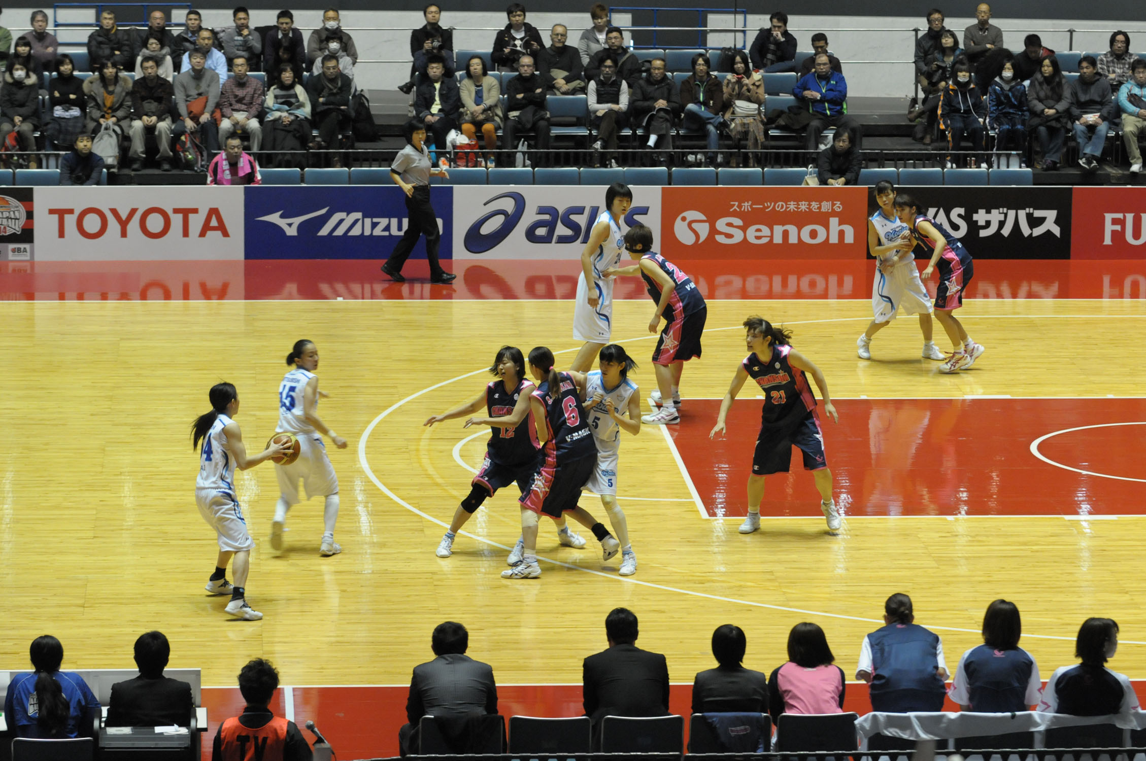 2014年全日本総合バスケットボール選手権大会準々決勝、三菱電機コアラーズ対シャンソンVマジック。代々木第一体育館で。